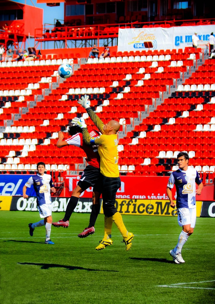 xolos vs pachuca, partido celebrado en el estadio Caliente de Tijuana para el apertura 2011 del fútbol mexicano